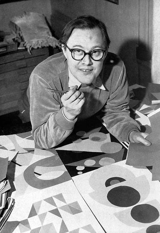 Sandro Key-Åberg